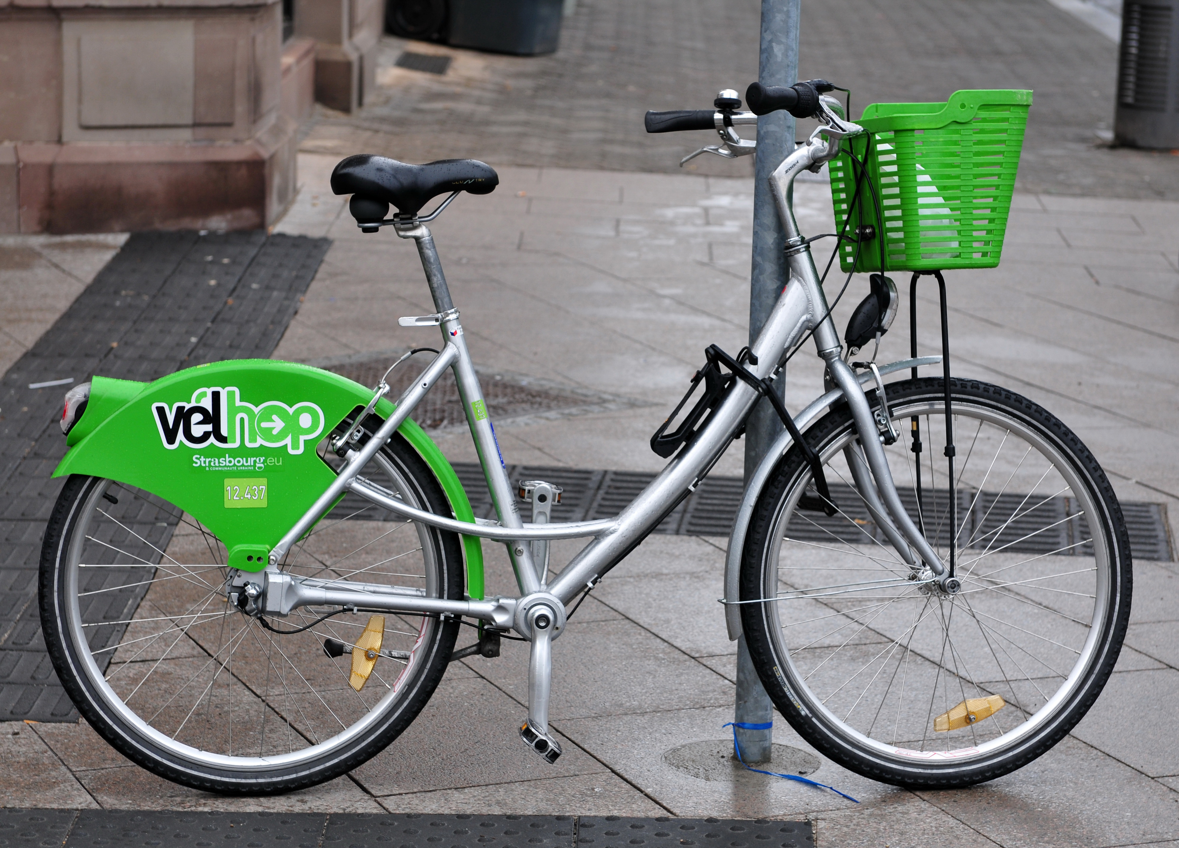 Straßburg European Parliament 2014 3.–7. February 2014, StrasbourgThis photo has been created within the project "WIKI loves parliaments / European Parliament". Usage and Help If you have any questions concerning this picture or how to use it, feel free to